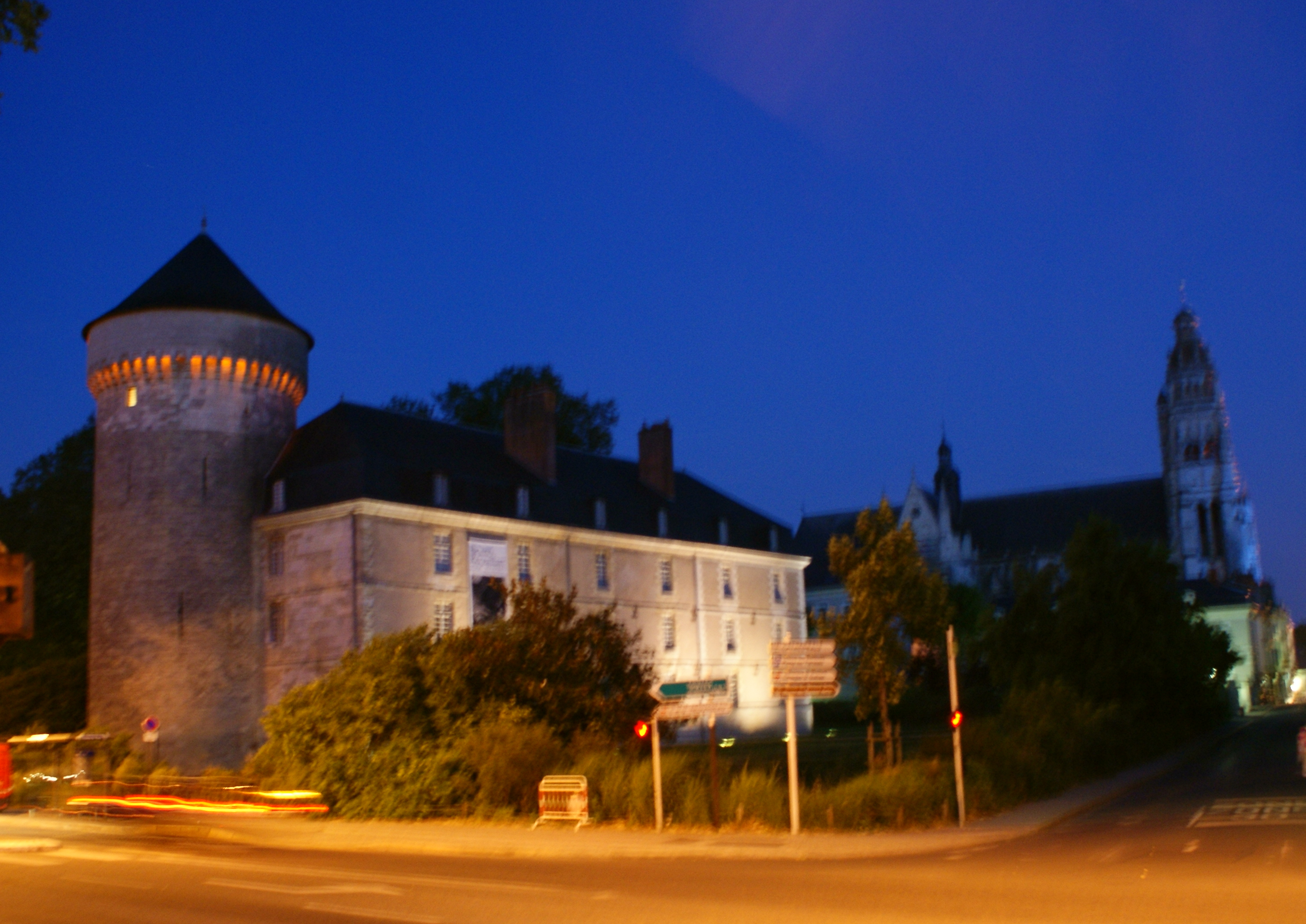 Château de Tours de nuit, dans la perspective de la cathédrale saint-Gatien elle-même illuminée